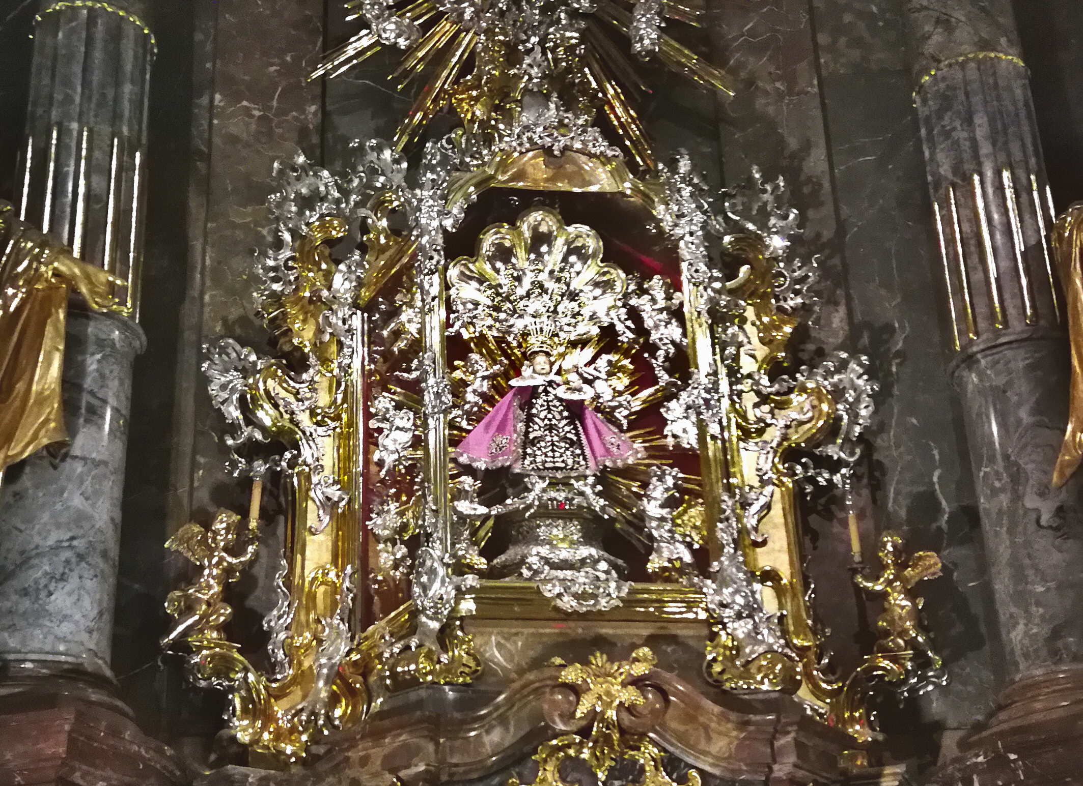 Praskie Dzieciątko Jezus na ołtarzu bocznym w kościele Panny Marii Zwycięskiej w Pradze